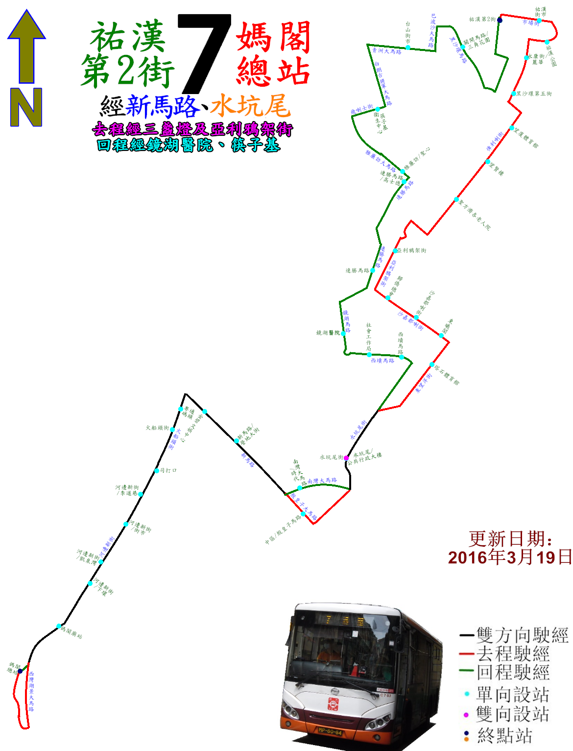 中文（香港）: 澳門巴士7路公車的走線圖